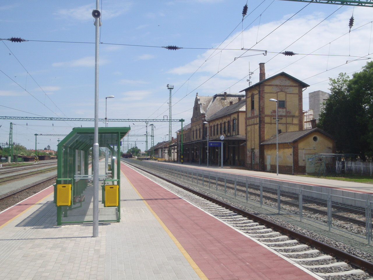 Bahnhof Körmend